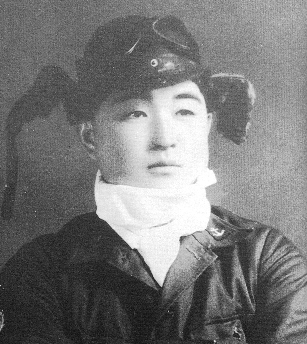 1944年、2飛曹時代の笠井智一。